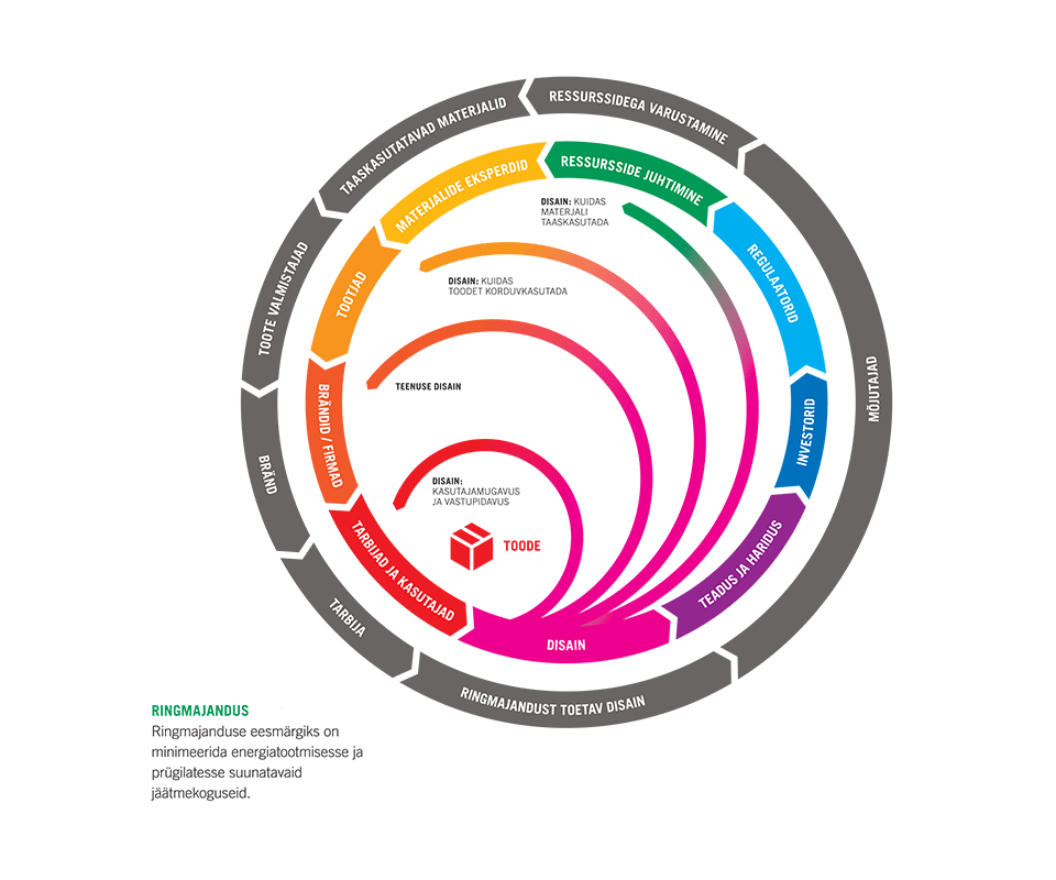 Ringmajandus circular economy osapooled stakeholders2